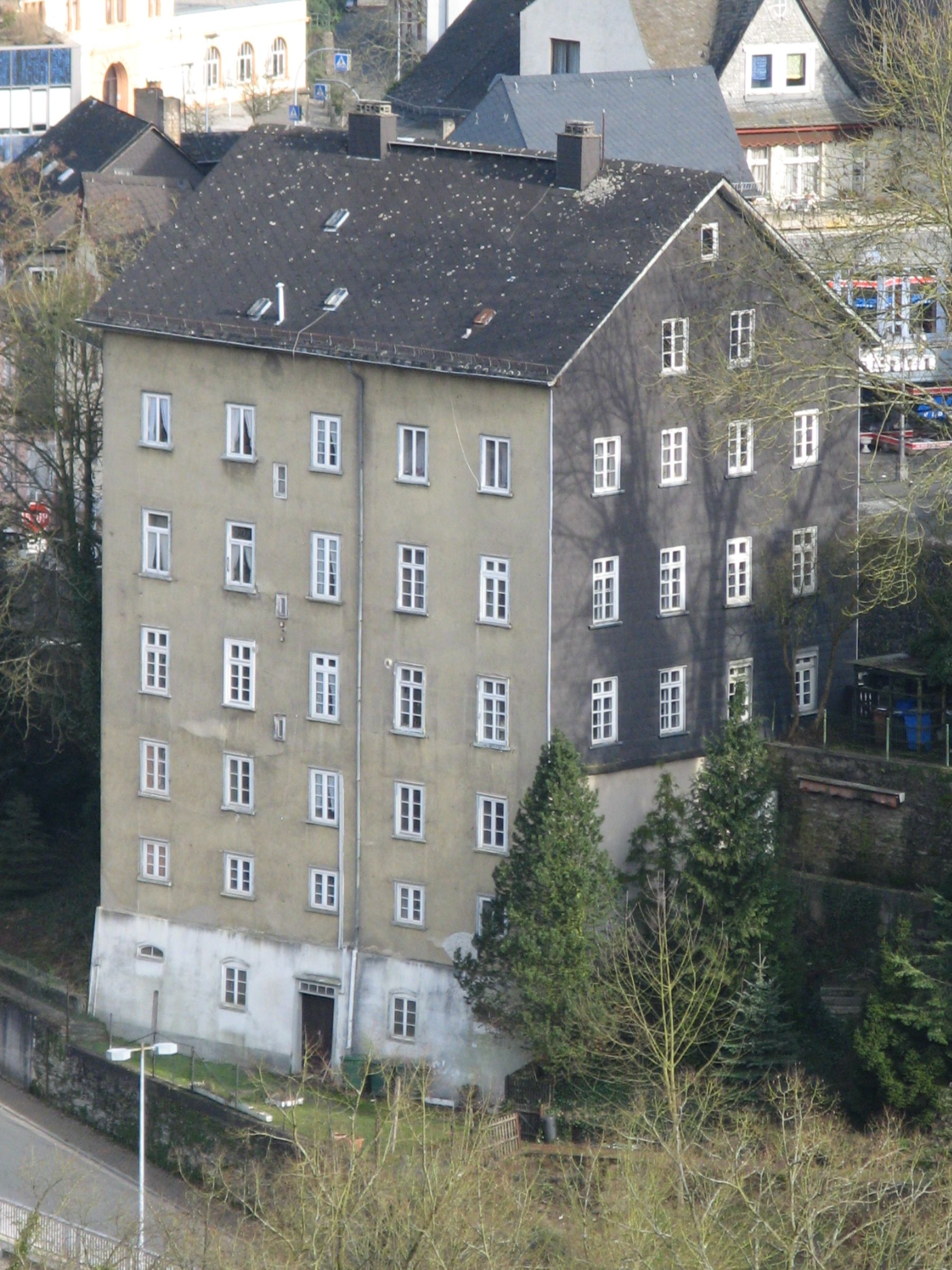 Der Pisé-Bau in Weilburg; erbaut vor 1836 von Wilhelm J. Wimpf